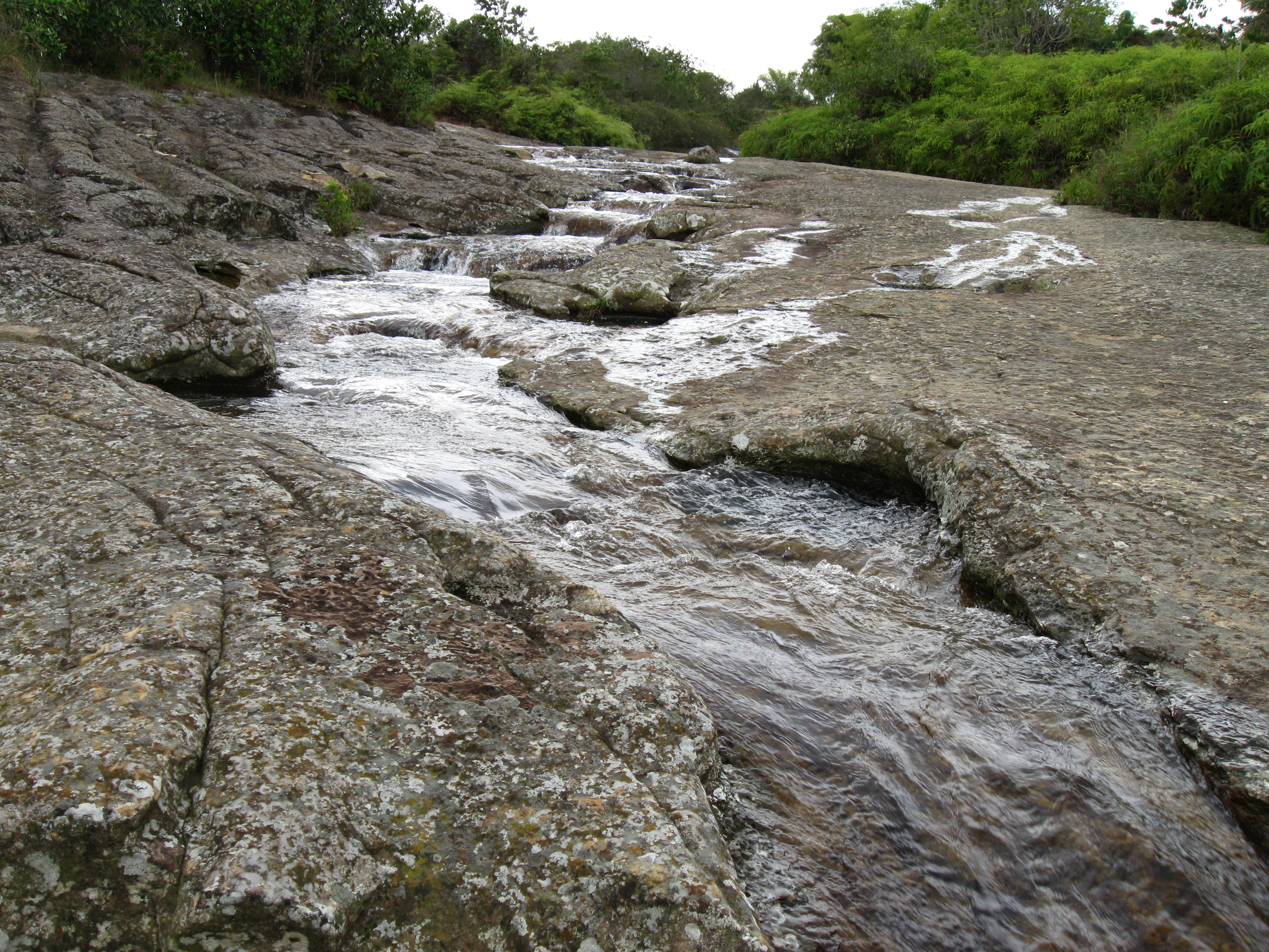 El Salitre, Guadalupe, Santander, Colombia